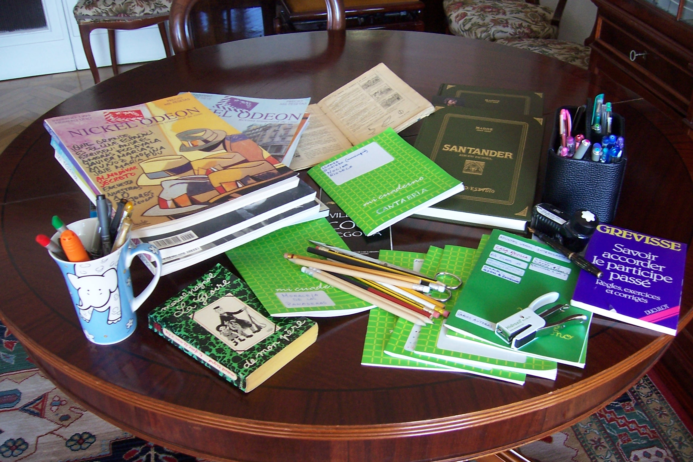 Cuadernos de apuntes, libros, lápices, bolígrafos y demás materiales de trabajo. Todo dispuesto para seguir editando artículos en es-Wikipedia.